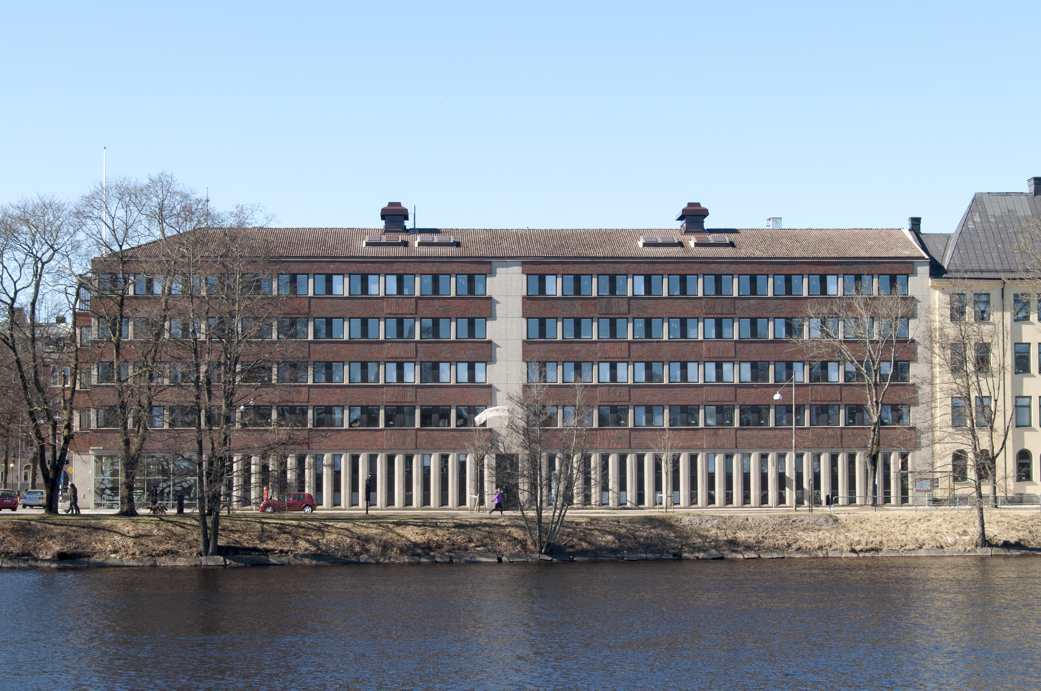 Landstingshuset i Karlstad för Värmlands läns landsting. Byggår 1973 för Vänerskog. Arkitektgruppen Ha/Ho/Li ((Lars-Erik Havstad, Gunnar Hollström och Göran Lindell